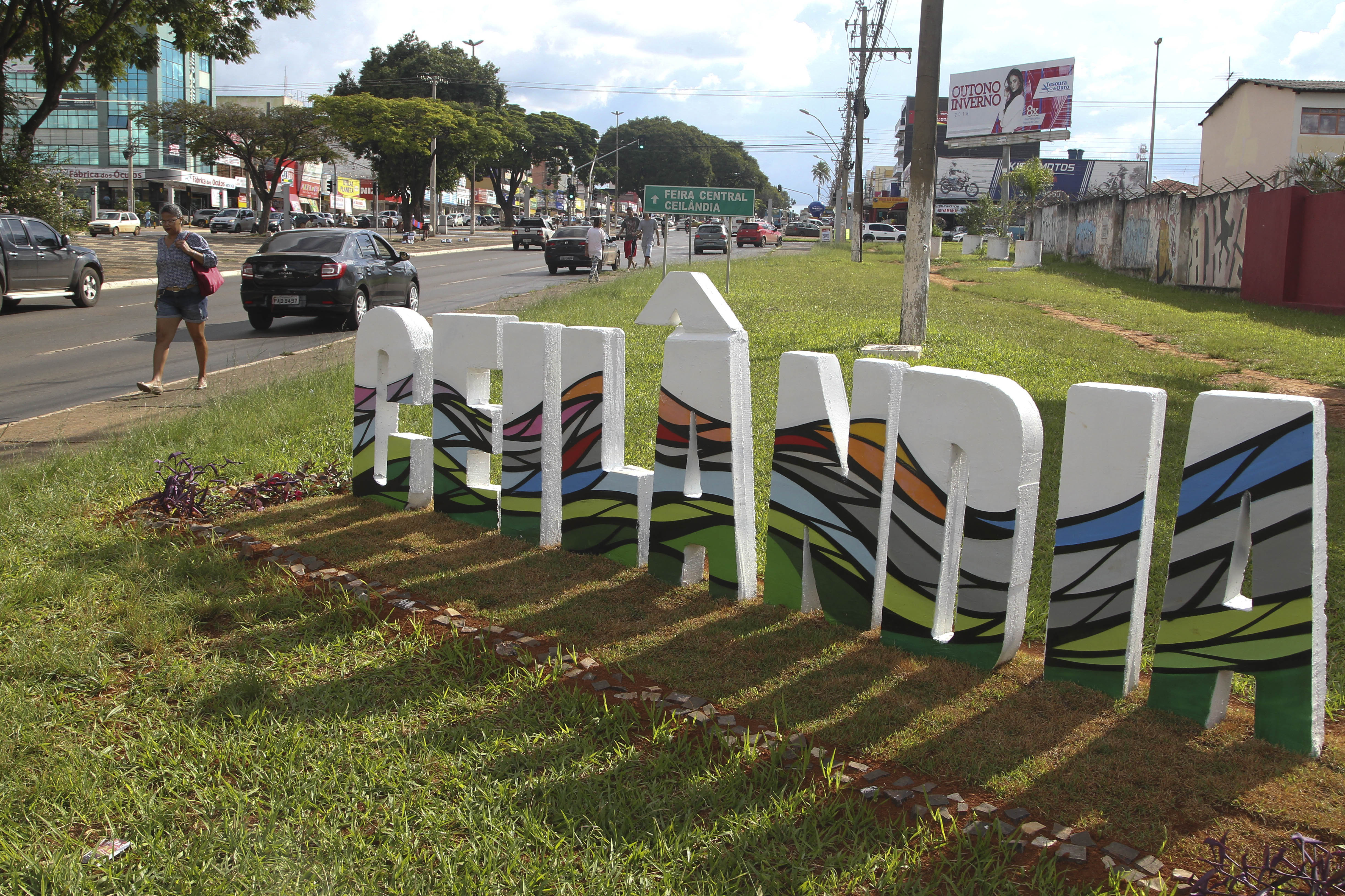 Ceilândia, DF, Brasil 23/3/2018 Foto: Toninho Tavares/Agência Brasília. Maior região administrativa do Distrito Federal, Ceilândia completa 47 anos na terça-feira (27). Para comemorar o aniversário, estão programadas ações de lazer, cidadania e saúde para a comunidade.